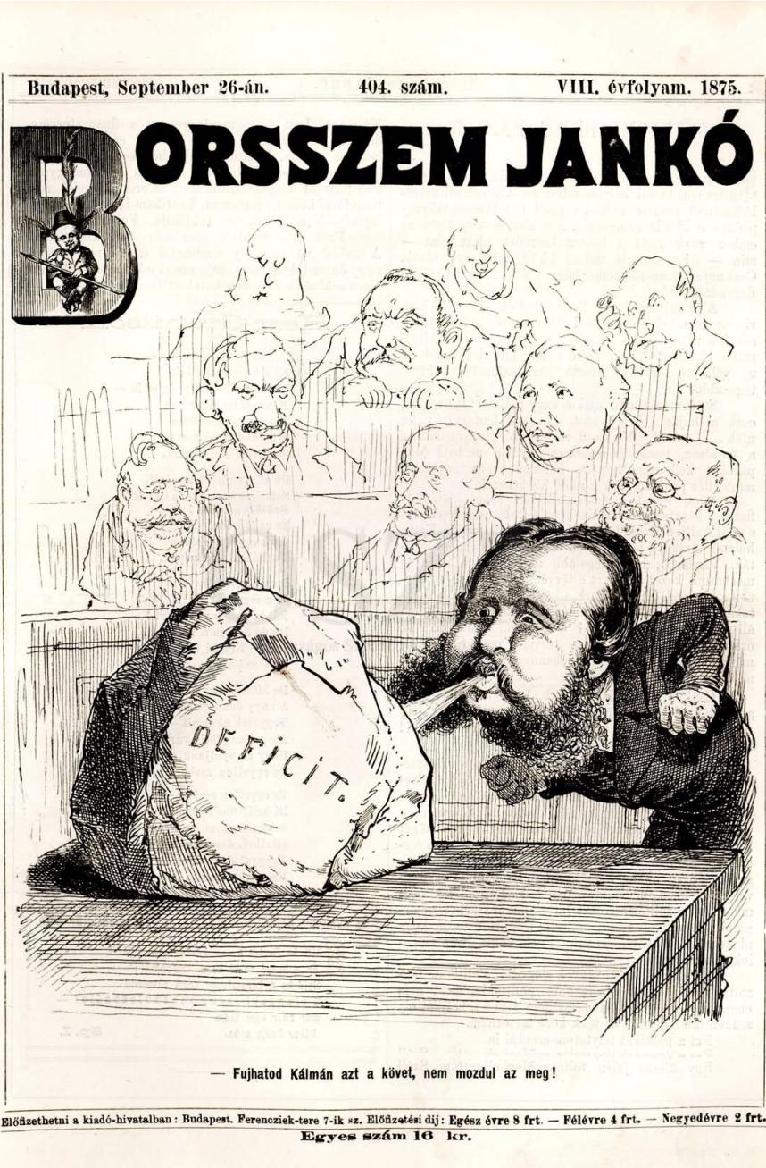 A Borsszem Jankó élclap címlapja 1875. szeptember 26.